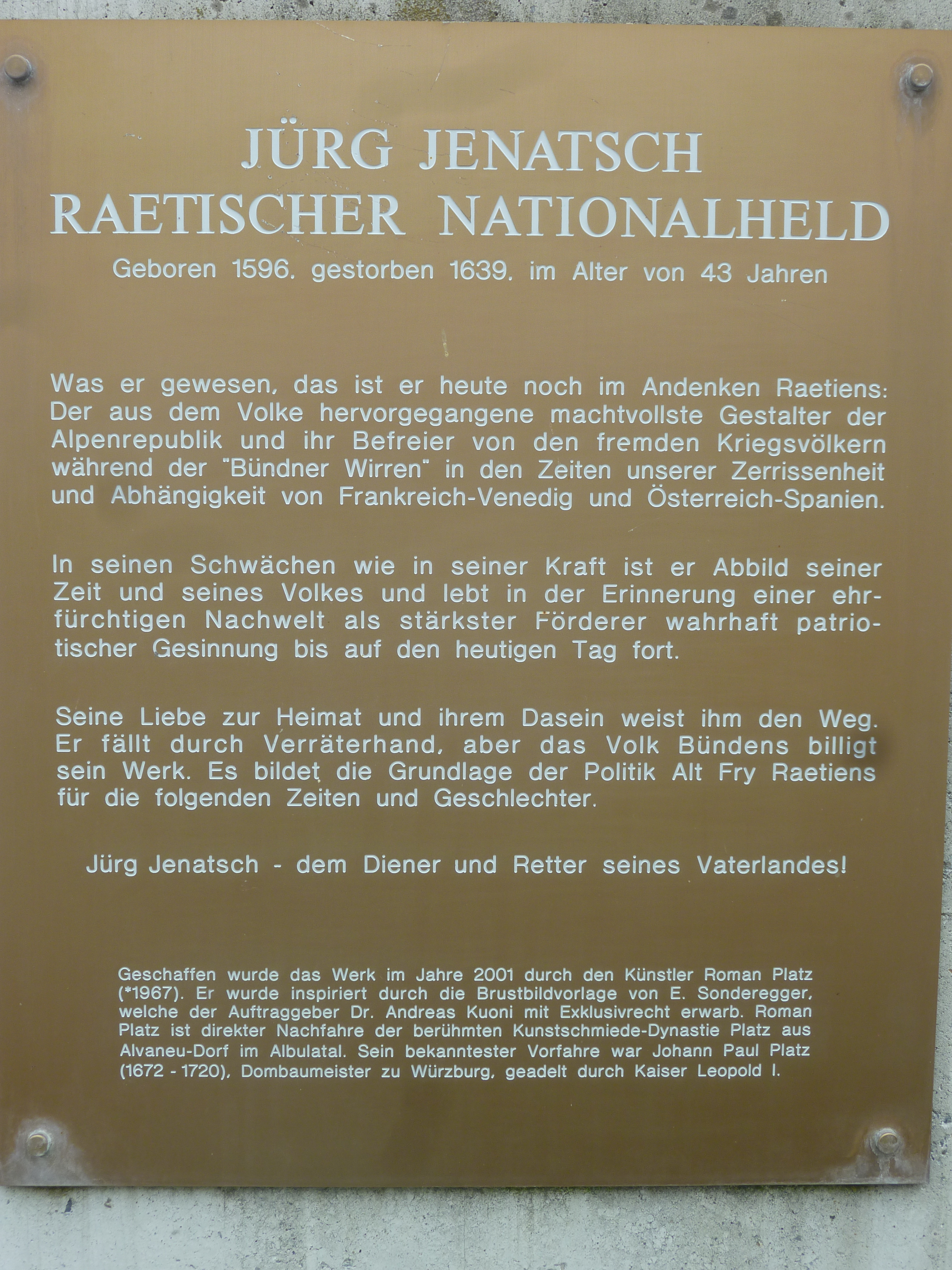 Georg Jenatsch, Tafel zum Denkmal von Roman Platz in Parpan, 2001